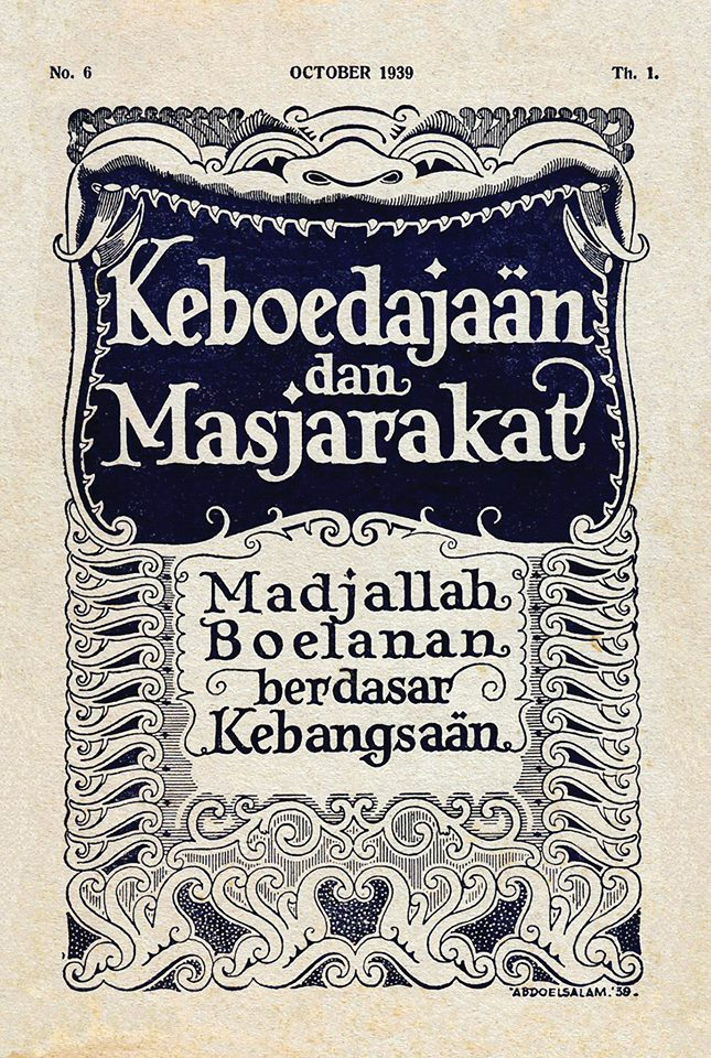 Majalah Kaboedajaän dan Masjarakat 1939